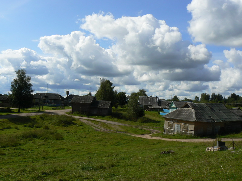 Рясня